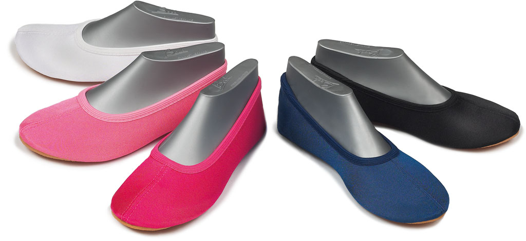 070 Basic weiss, schwarz, rosa, pink, dunkelblau